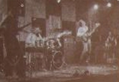 Aquelarre (banda argentina) en directo. Madrid, 1976